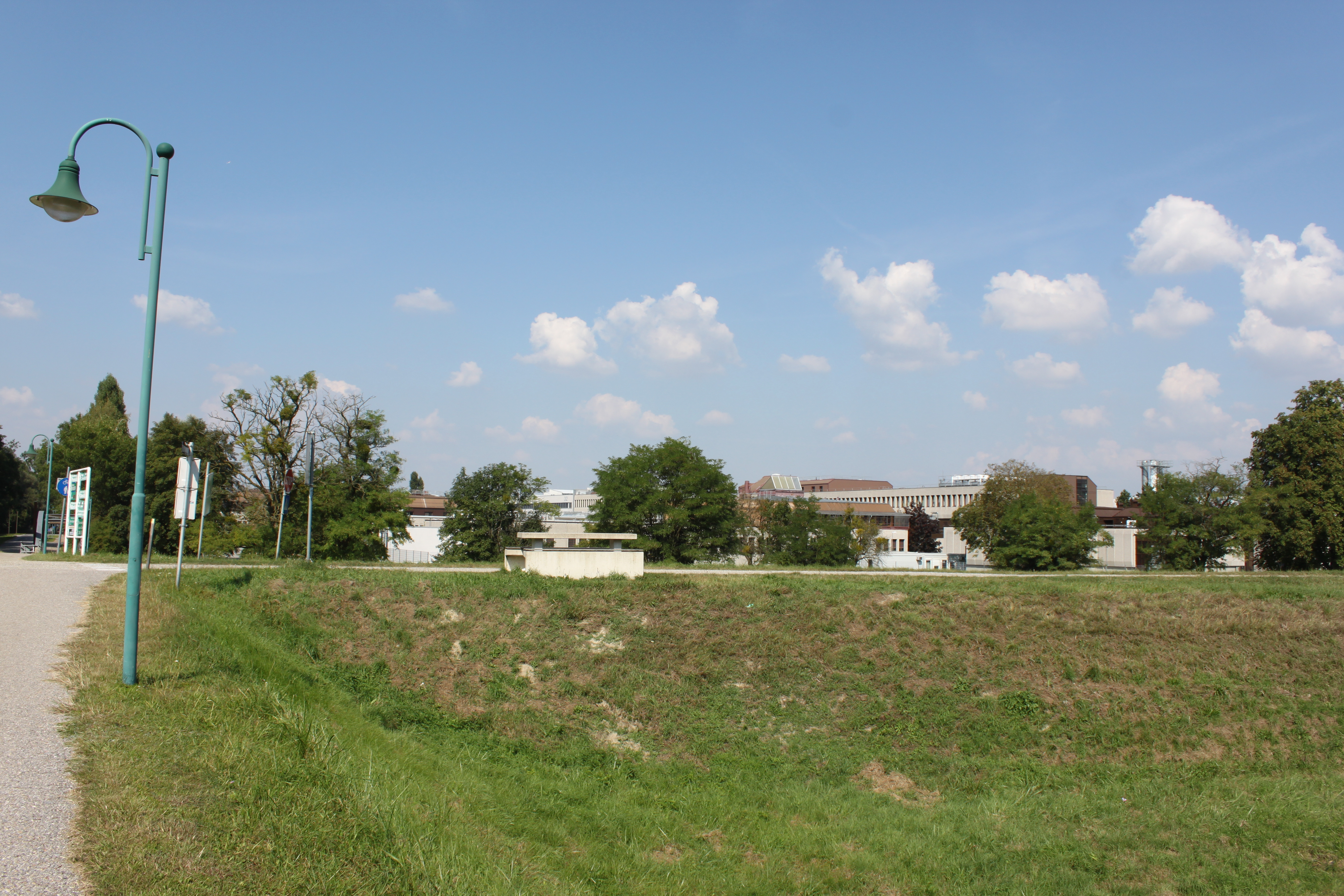 Uferstraße kreuzt Hochwasserschutzdamm, links hinten Fadenbach-Doppelbrücke, rechts hinten Baxter Orth an der Donau